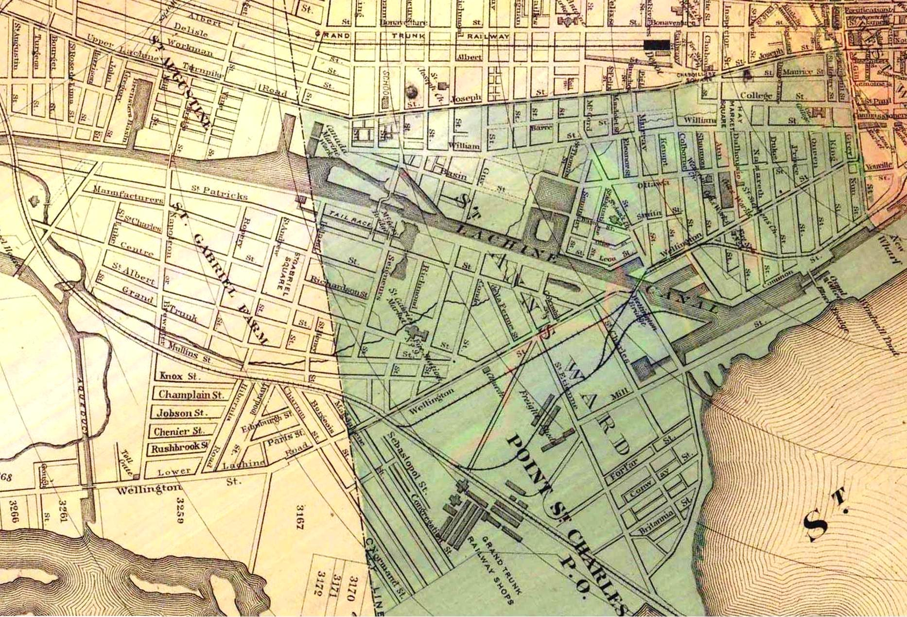 Détail de la carte de Montréal de 1859 faisant ressortir Pointe Saint-Charles.